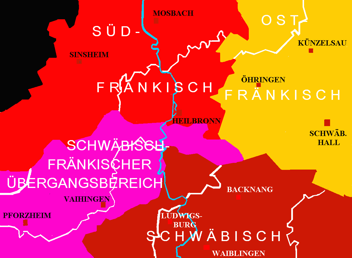 Eigenes Werk nach Historischer_Atlas_von_Baden-Württemberg_Blatt_XII,7_Sprachkarte_von_Baden-Württemberg.PNG